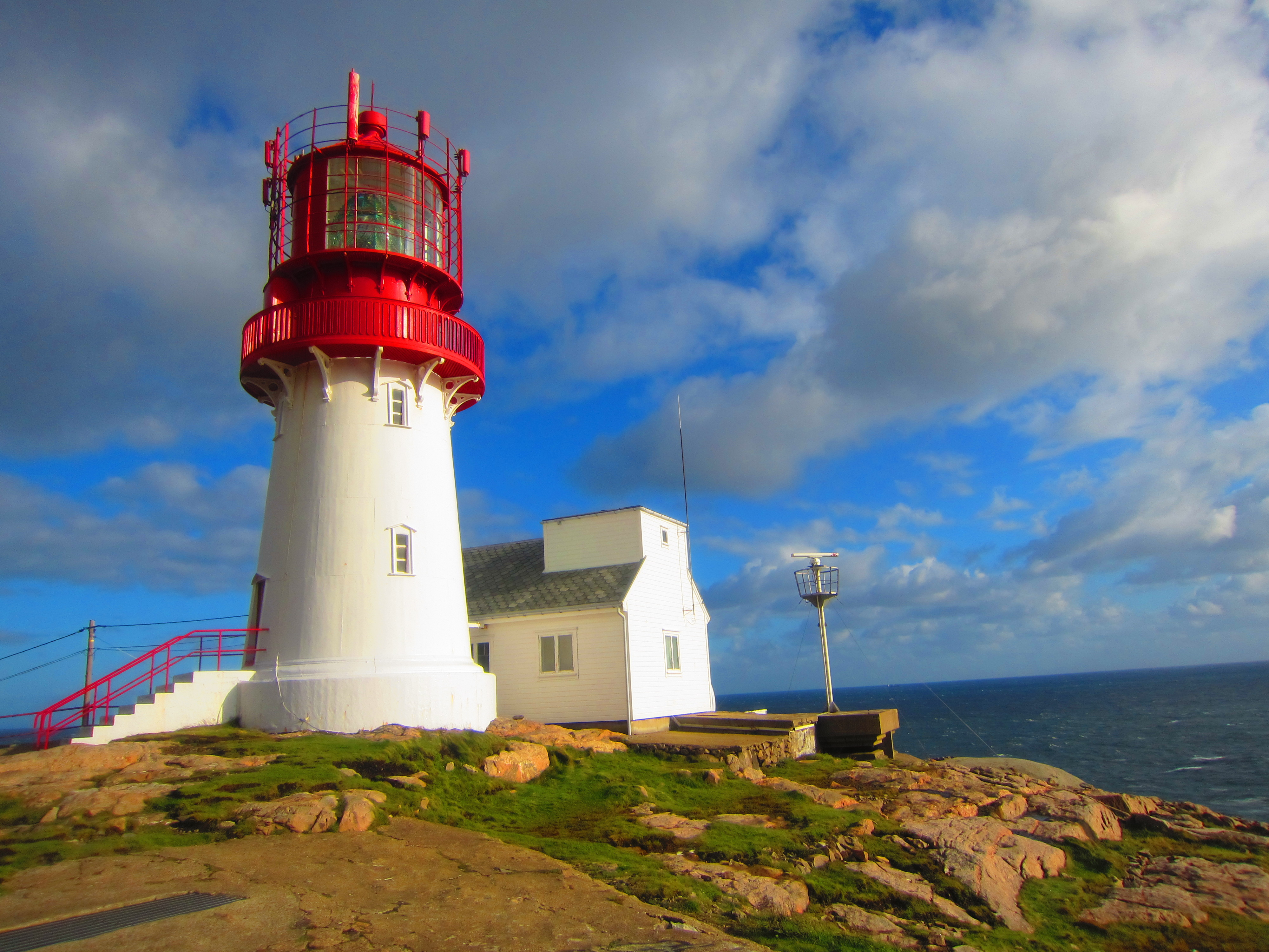 Das Lindesnes fyr ist Norwegens ältester und südlichster Leuchtturm auf dem Festland. Am 27. Februar 1655 wurde hier Norwegens erstes Leuchtfeuer angezündet.